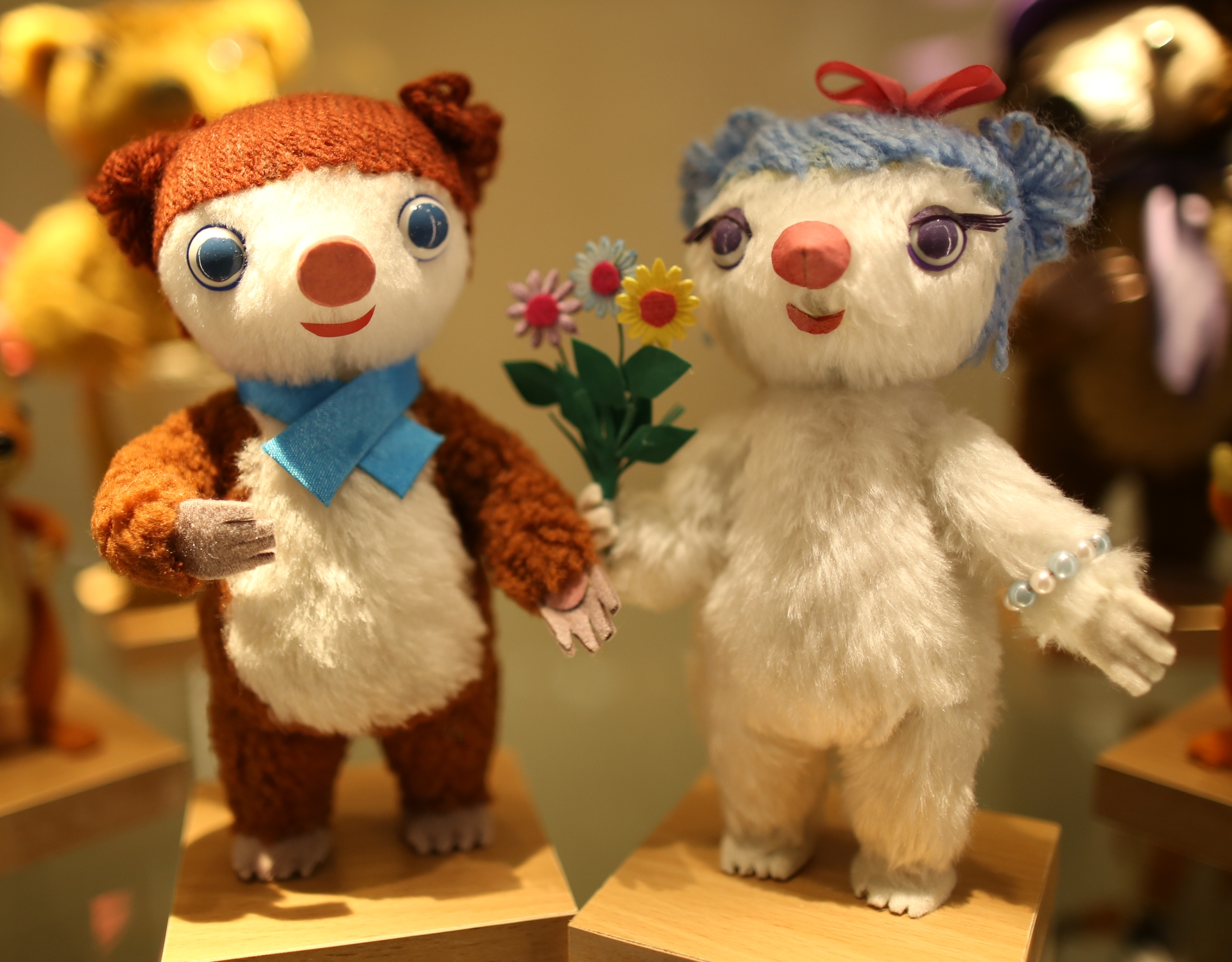 Mis Coralgol